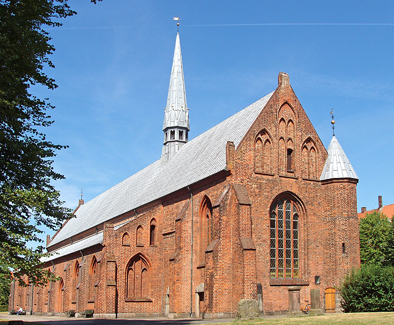 Horsens Klosterkirke Horsens , Vejle Amt/Region MIdtjylland, Danmark Set fra sydøst